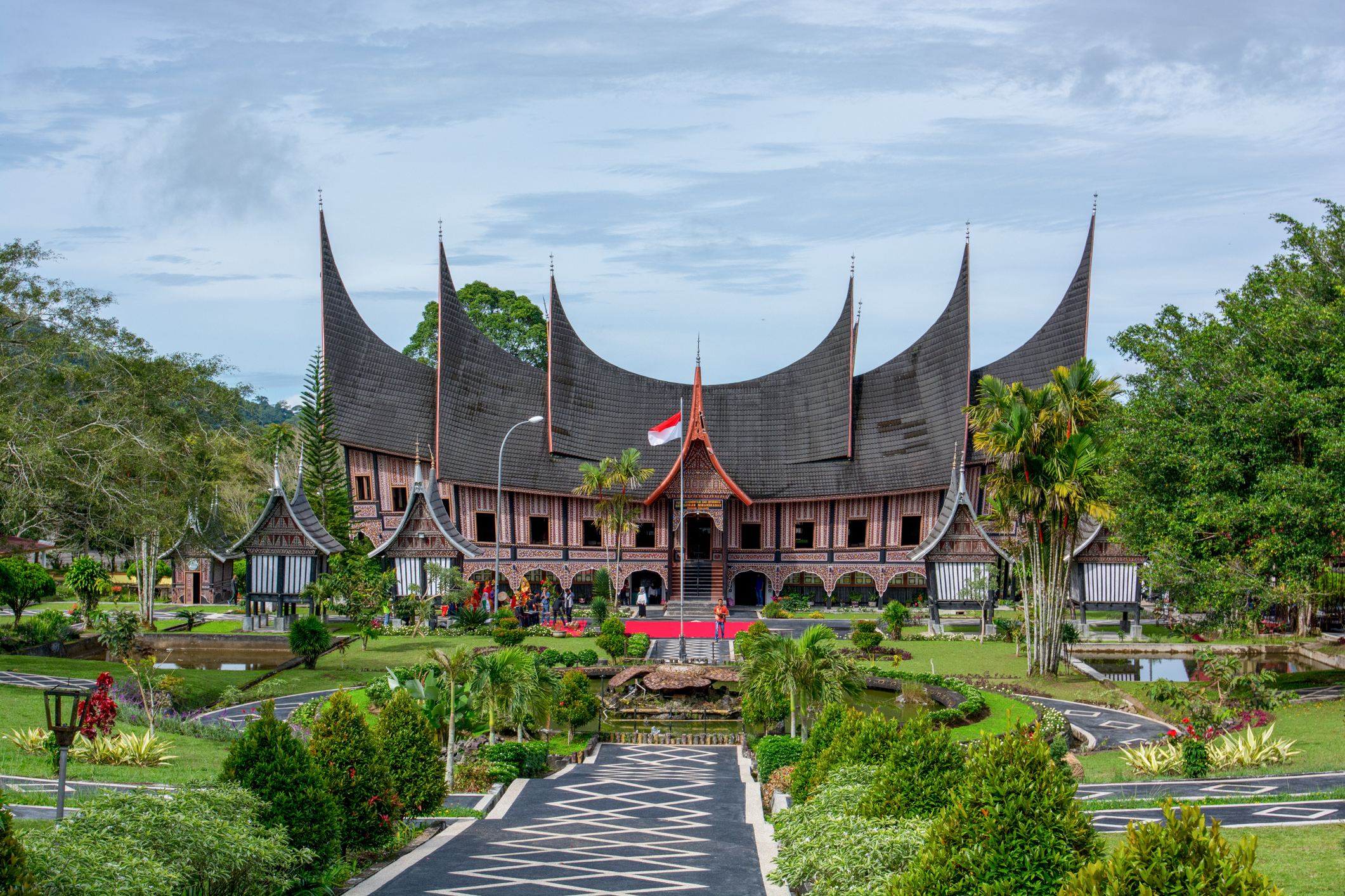 PDIKM Sumatra